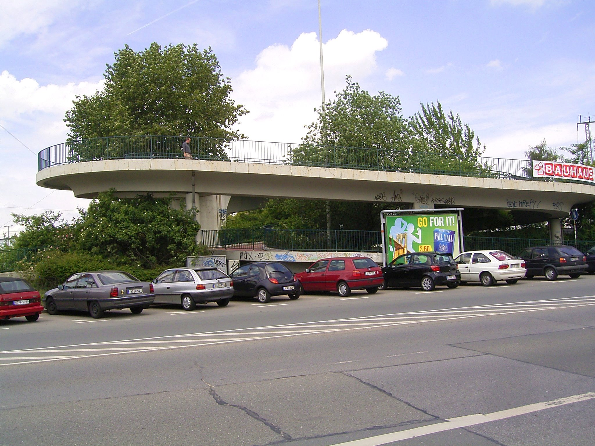 Rittershausener Brücke über die Wupper in Wuppertal